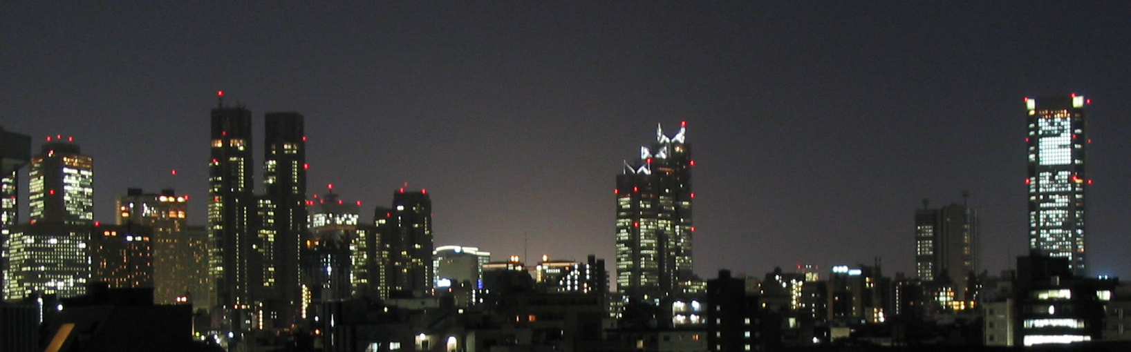 Night view of Nishi-Shinjuku skyscrapers, Shinjuku, Tokyo.